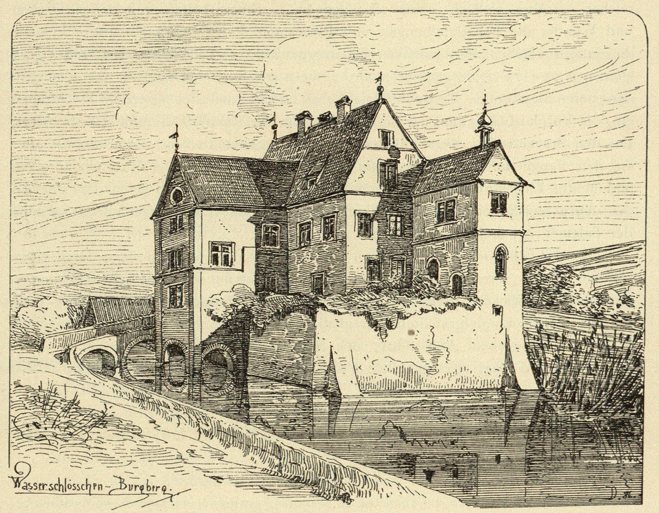 Burgberg (bei Überlingen), Wasserschlösschen Abbildung aus: Franz Xaver Kraus: Die Kunstdenkmäler des Grossherzogthums Baden. Band 1: Die Kunstdenkmäler des Kreises Konstanz. Freiburg i. Br. 1887